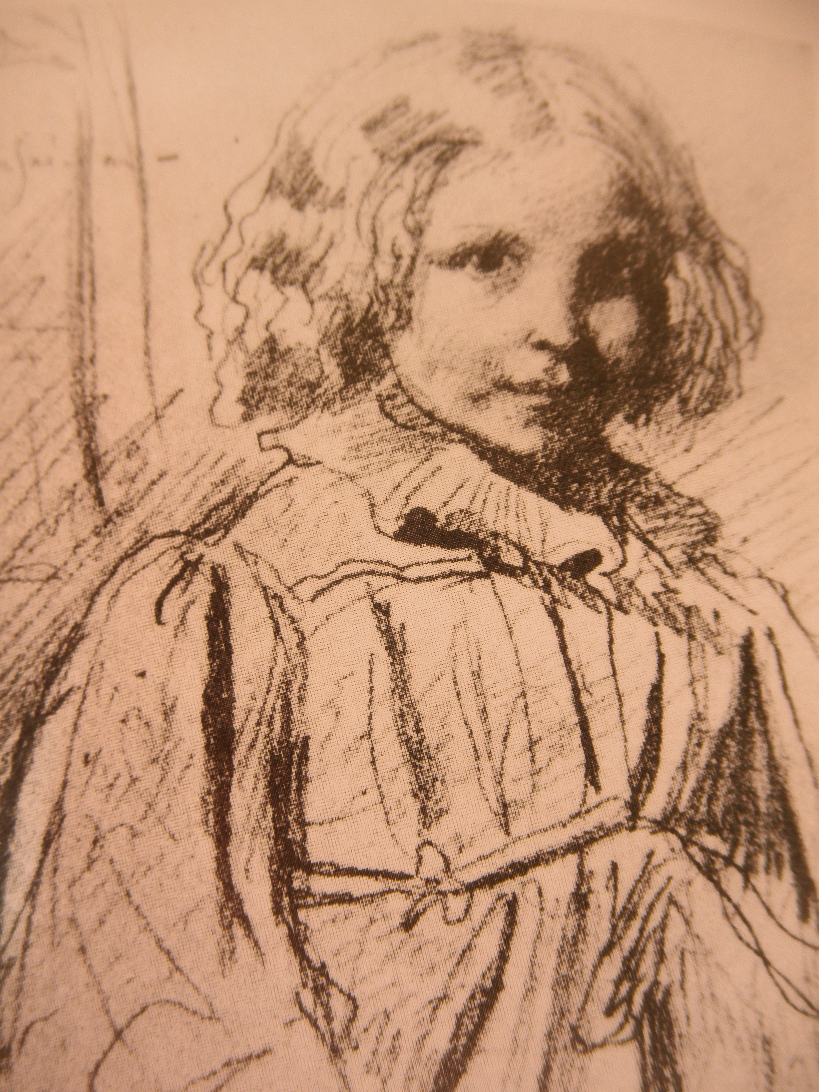 dessin par théodore chassériau en 1840